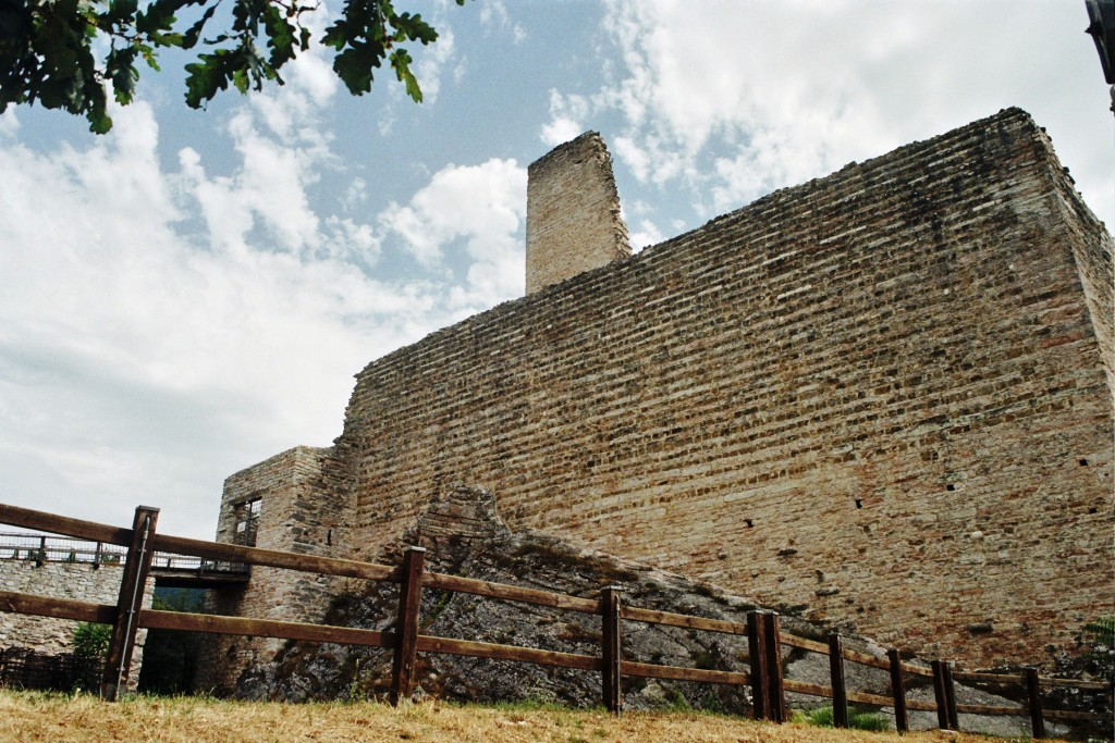 La Rocca Varano è una antica fortezza, costruita su uno sperone roccioso a poca distanza dal centro abitato di Camerino. Eretta nel dodicesimo secolo come residenza fortificata della nobile famiglia dei Varano, sarà poi trasformata in fortezza difensiva. Per la futura signoria la Rocca costituiva una vera e propria fonte di guadagno, grazie ai pedaggi imposti alle genti che percorrevano la strada sottostante che collegava Roma all'Adriatico. Nel periodo successivo alla fine del Ducato di Camerino, si salva dal degrado perché trasformata in casa colonica. Di recente parzialmente restaurata, l'antica Rocca è Centro dell'artigianato e sede di convegni, mostre e manifestazioni. This is a photo of a monument which is part of cultural heritage of Italy.